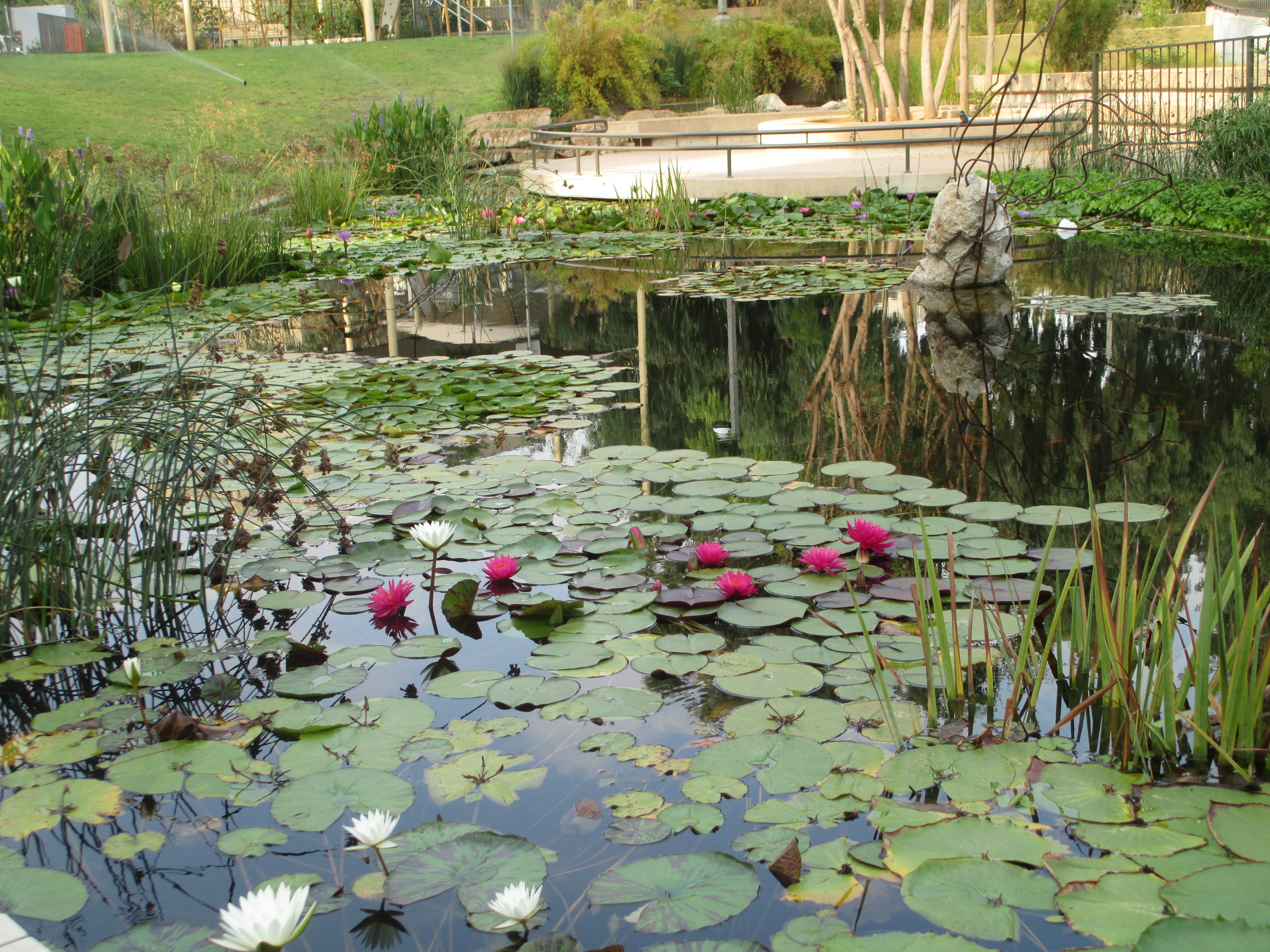 פרחי נימפאה בגן קריית ספר בתל אביב